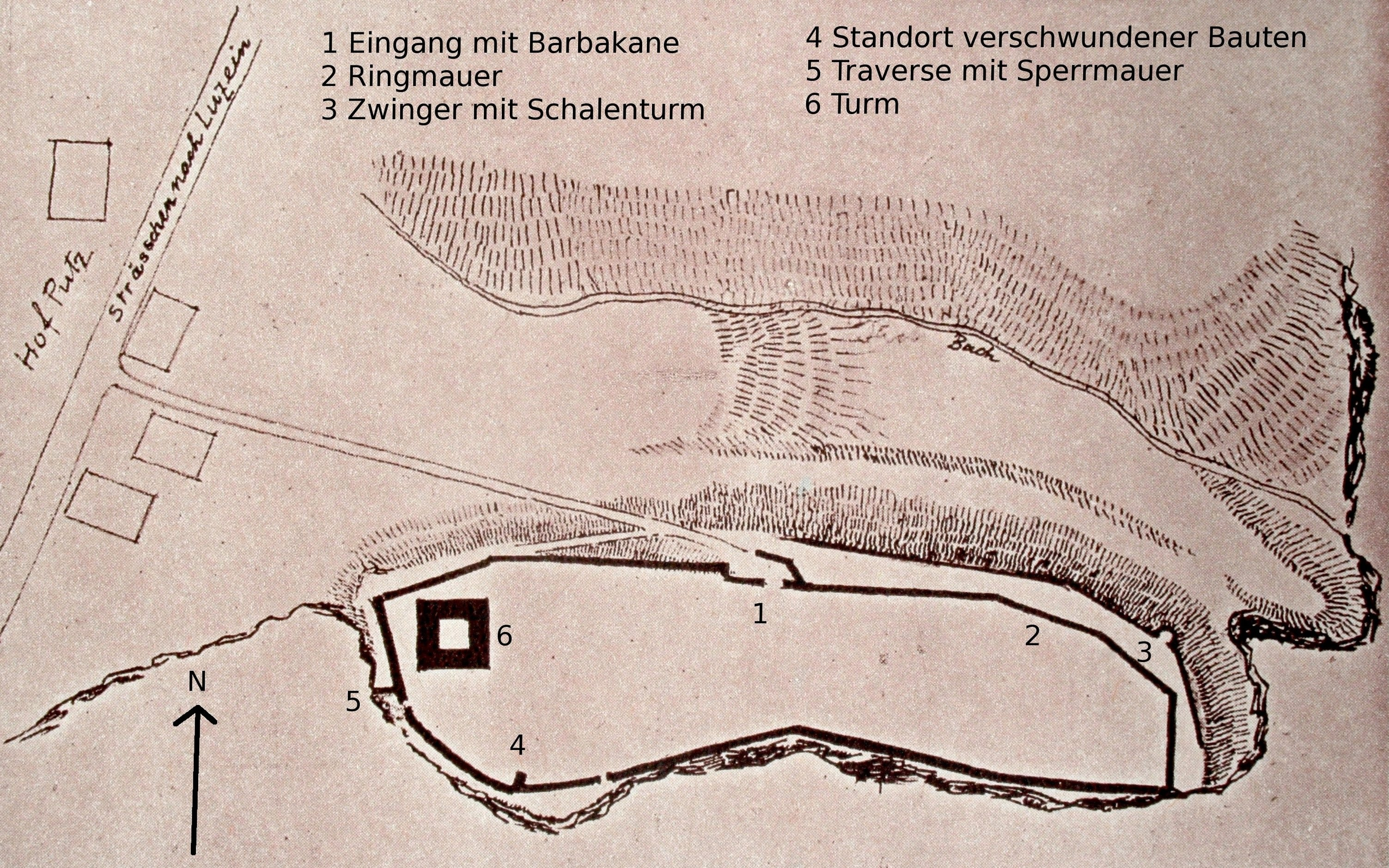 Plan der Anlage, unter Verwendung einer Zeichnung von J.R. Rahn, 1892